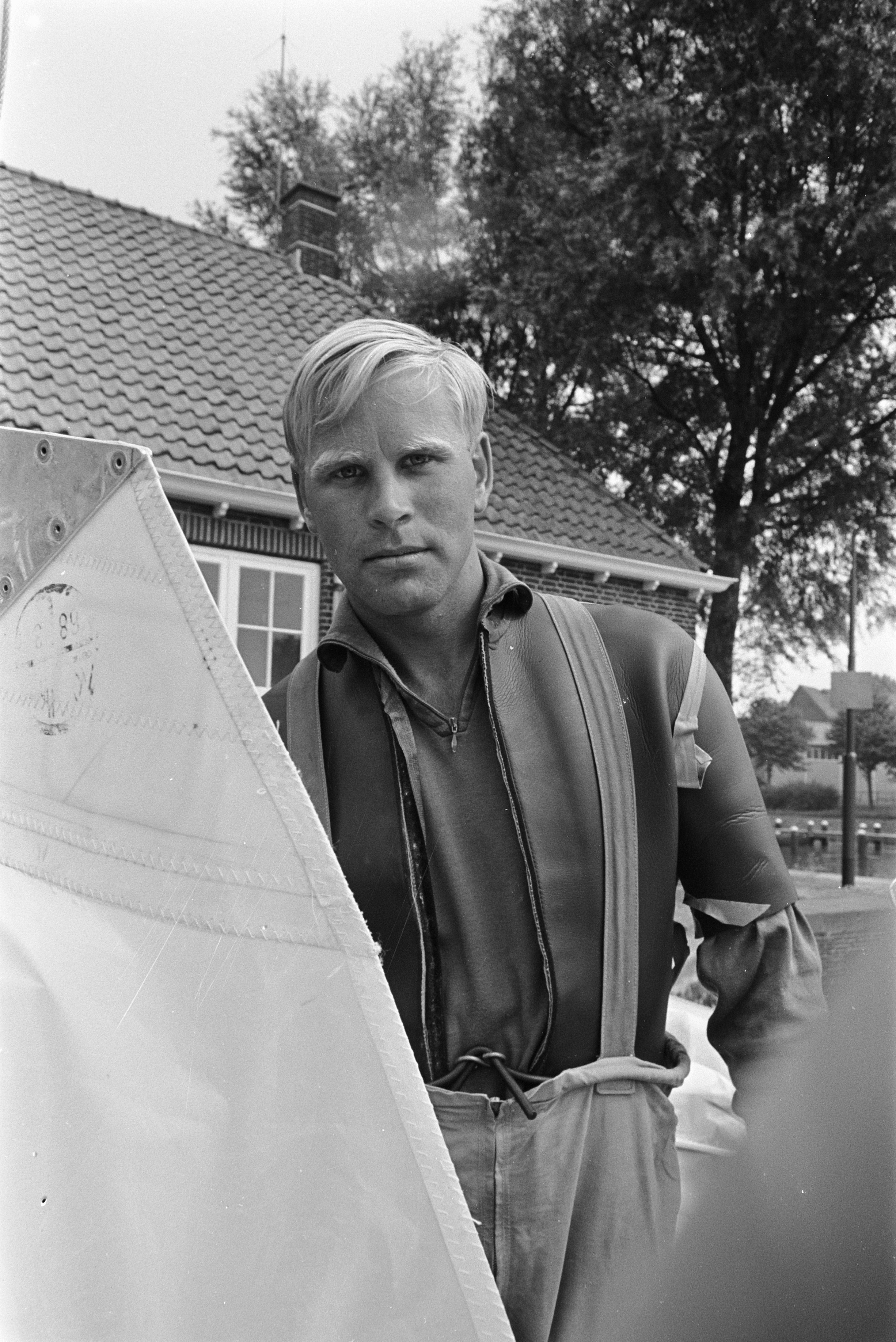 Collectie / Archief : Fotocollectie Anefo Reportage / Serie : Europese kampioenschappen Finnjollen op het IJsselmeer bij Medemblik Beschrijving : Deelnemer Boudewijn Binkhorst met zijn boot Datum : 28 augustus 1968 Locatie : Medemblik, Noord-Holland Trefwoorden : portretten, zeilen Persoonsnaam : Binkhorst, Boudewijn Fotograaf : Ron Kroon / Anefo Auteursrechthebbende : Nationaal Archief Materiaalsoort : Negatief (zwart/wit) Nummer archiefinventaris : bekijk toegang 2.24.01.05 Bestanddeelnummer : 921-6316